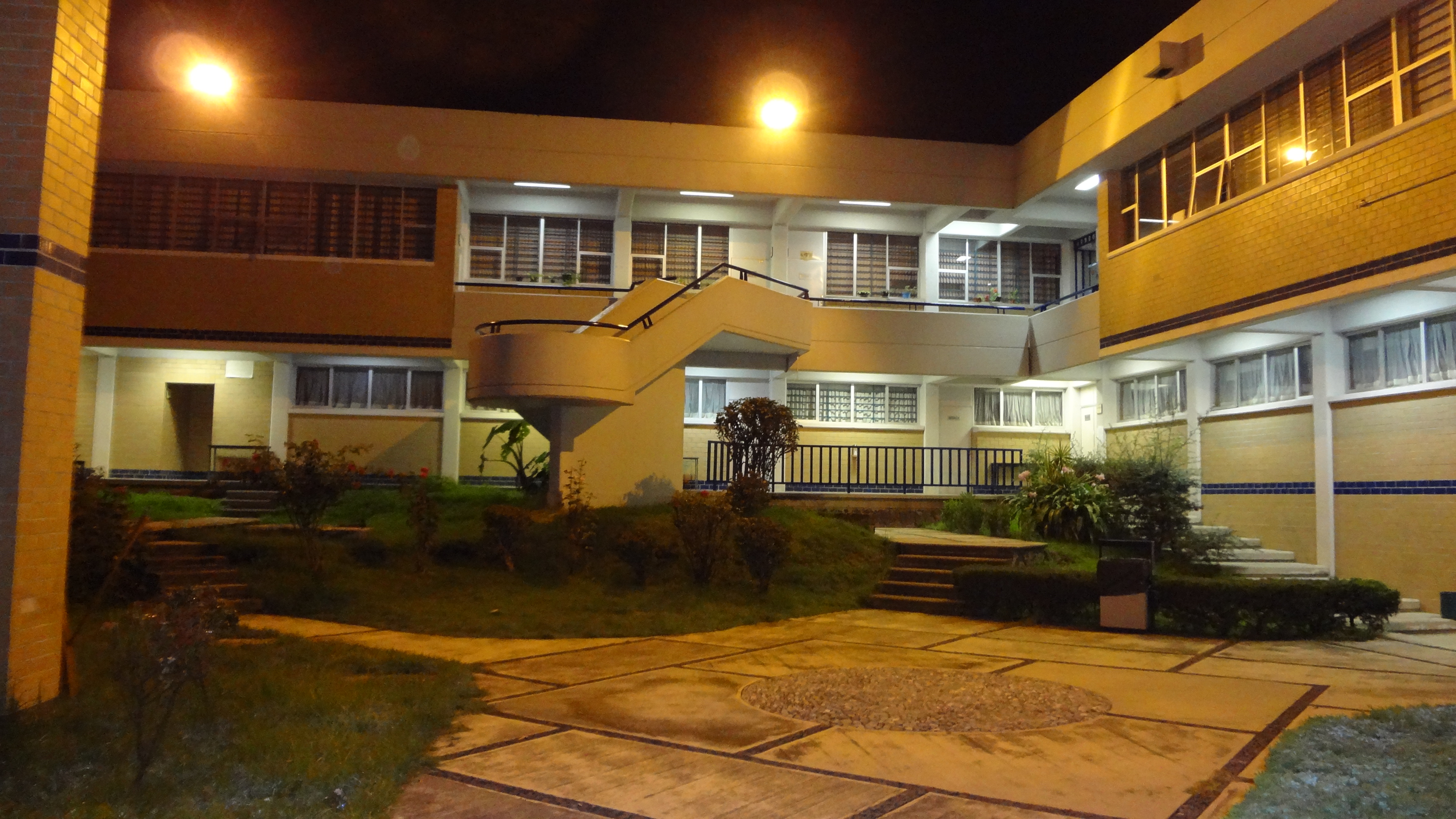 Foto tomada por Marco Antonio Rodríguez Cabello